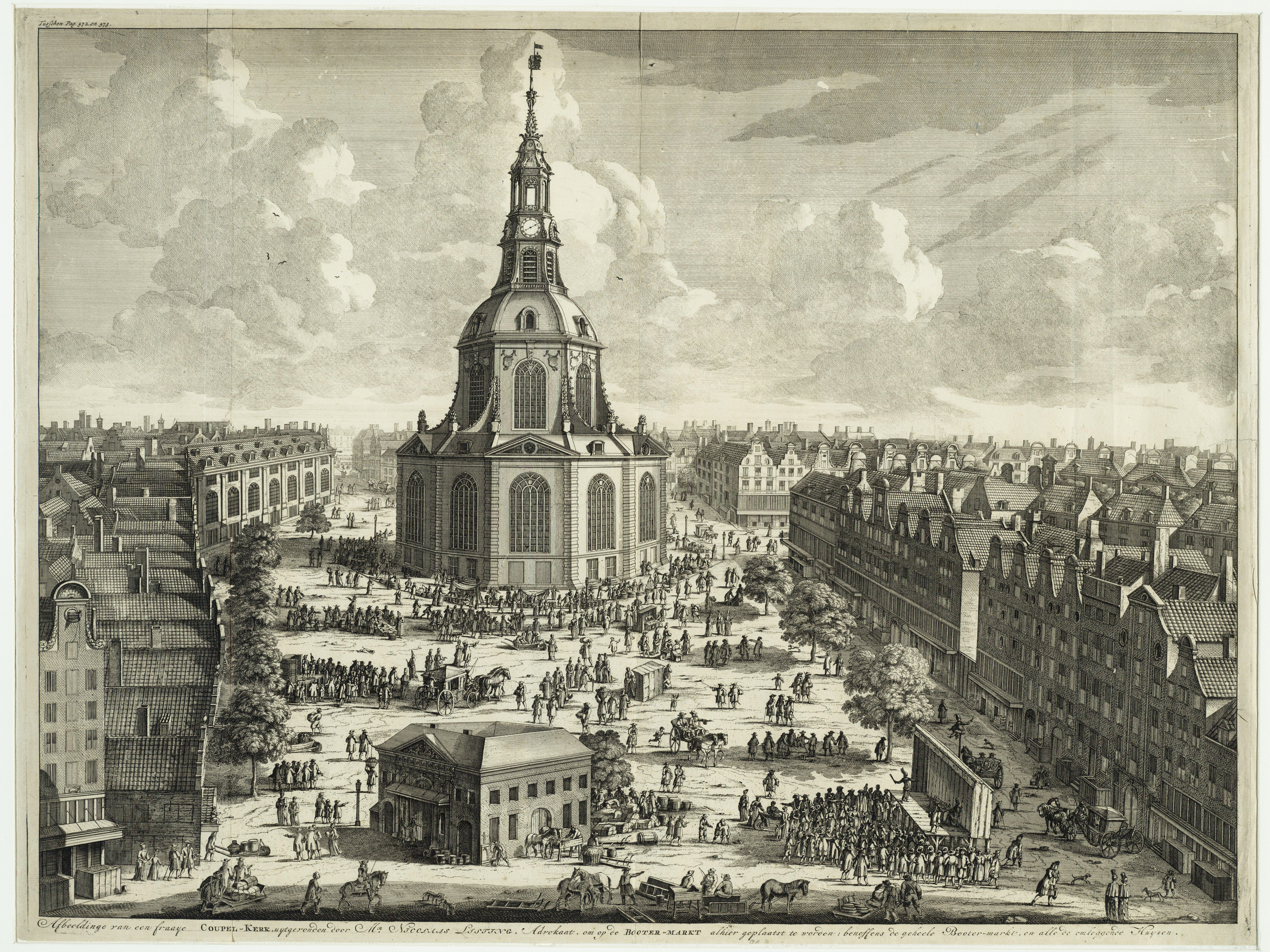 Beschrijving Afbeeldinge van een fraaye Coupel-Kerk, ... etc Vogelvluchtgezicht van de Botermarkt (thans Rembrandtplein), gezien vanuit de kant van de Reguliersbreestraat in oostelijke richting. Op het plein de voorgestelde maar nooit gerealiseerde koepelkerk op initiatief van Nicolaes Listingh. Op de voorgrond de Boterwaag, verder talloze figuren, koetsen en enkele marktkramen en podia met toneelvoorstellingen. Ets en gravure. Afmetingen: 540x718 mm. (blad) Documenttype prent Vervaardiger Stopendaal, Daniël Collectie Collectie Stadsarchief Amsterdam: tekeningen en prenten Datering 1729 Geografische naam Botermarkt Rembrandtplein Inventarissen Afbeeldingsbestand 010097016156